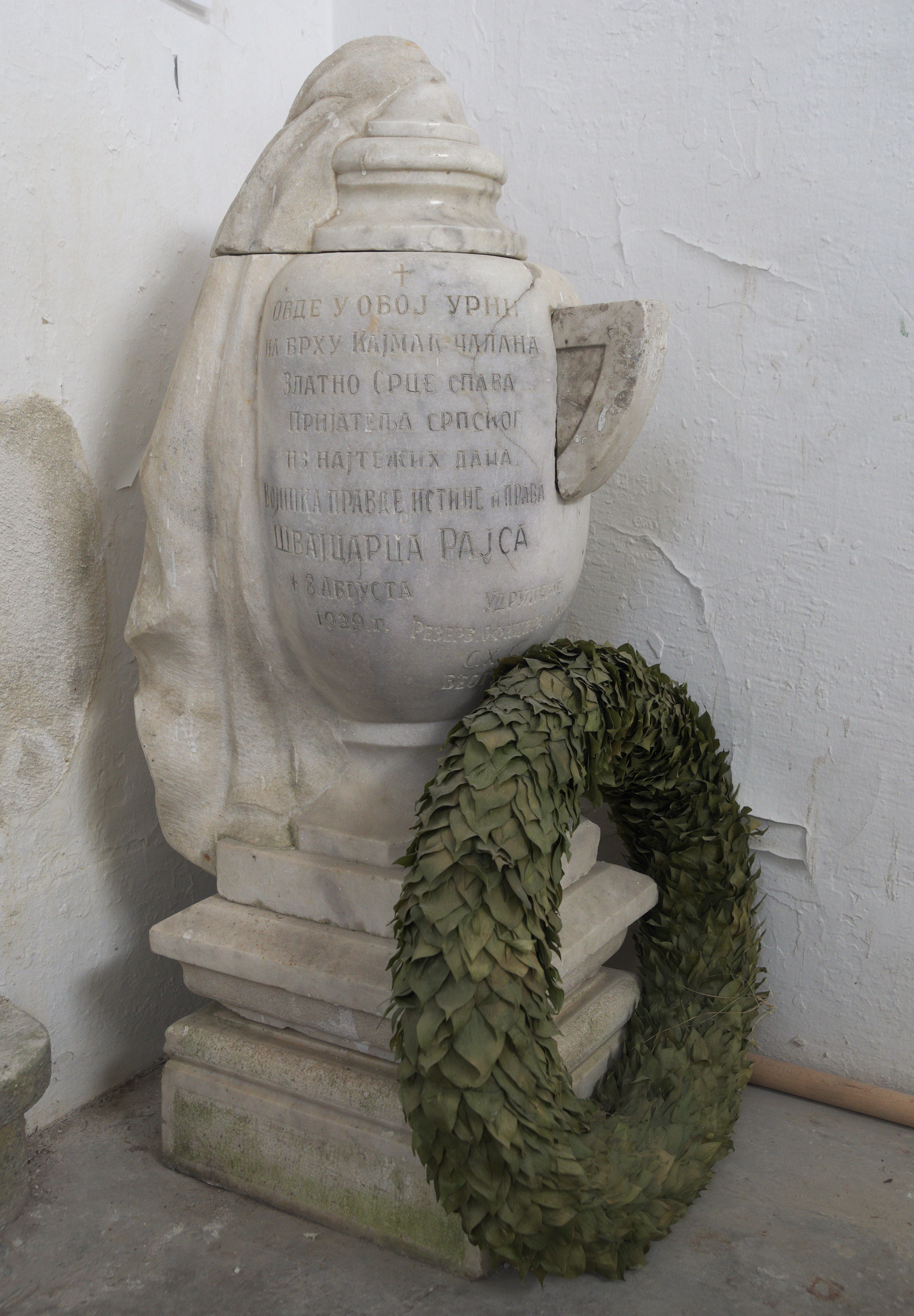 Српски (ћирилица): Урна Арчибалда Рајса (Кајмакчалан)